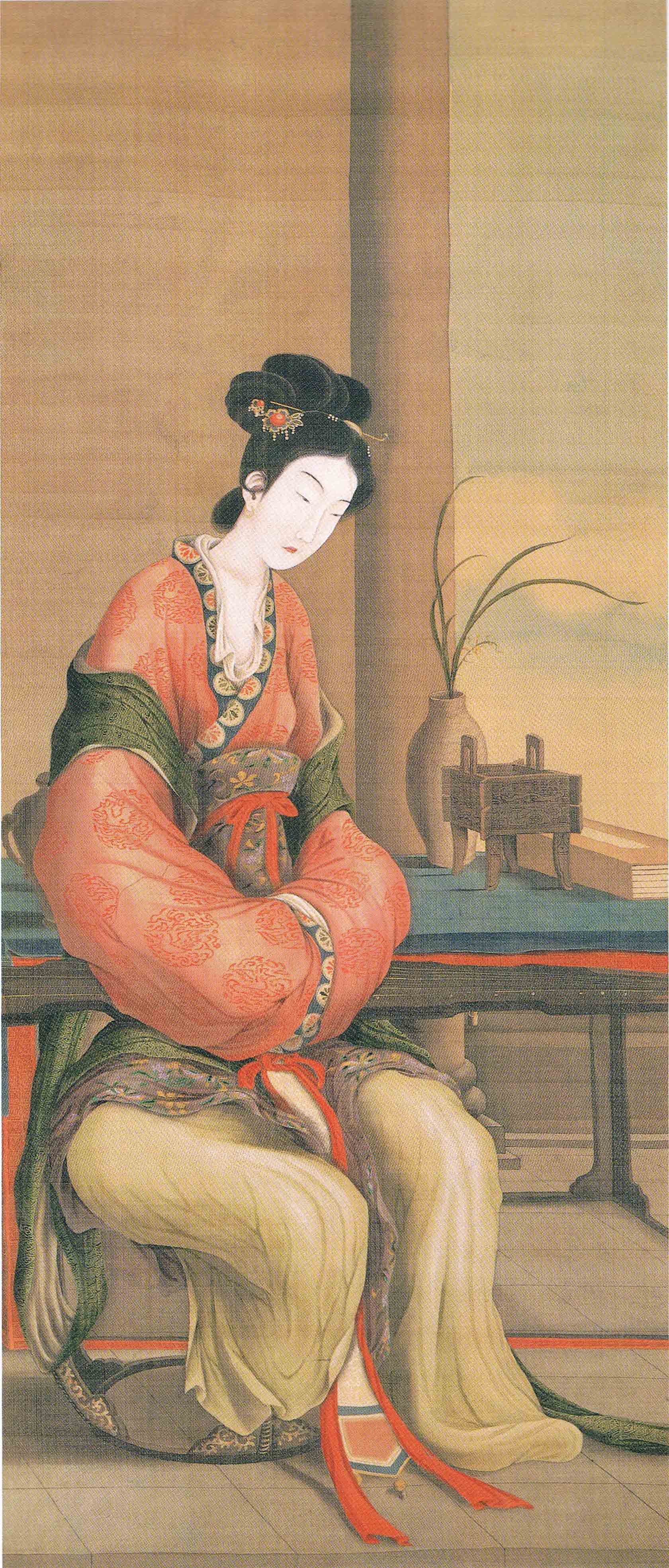 司馬江漢-卓文君象